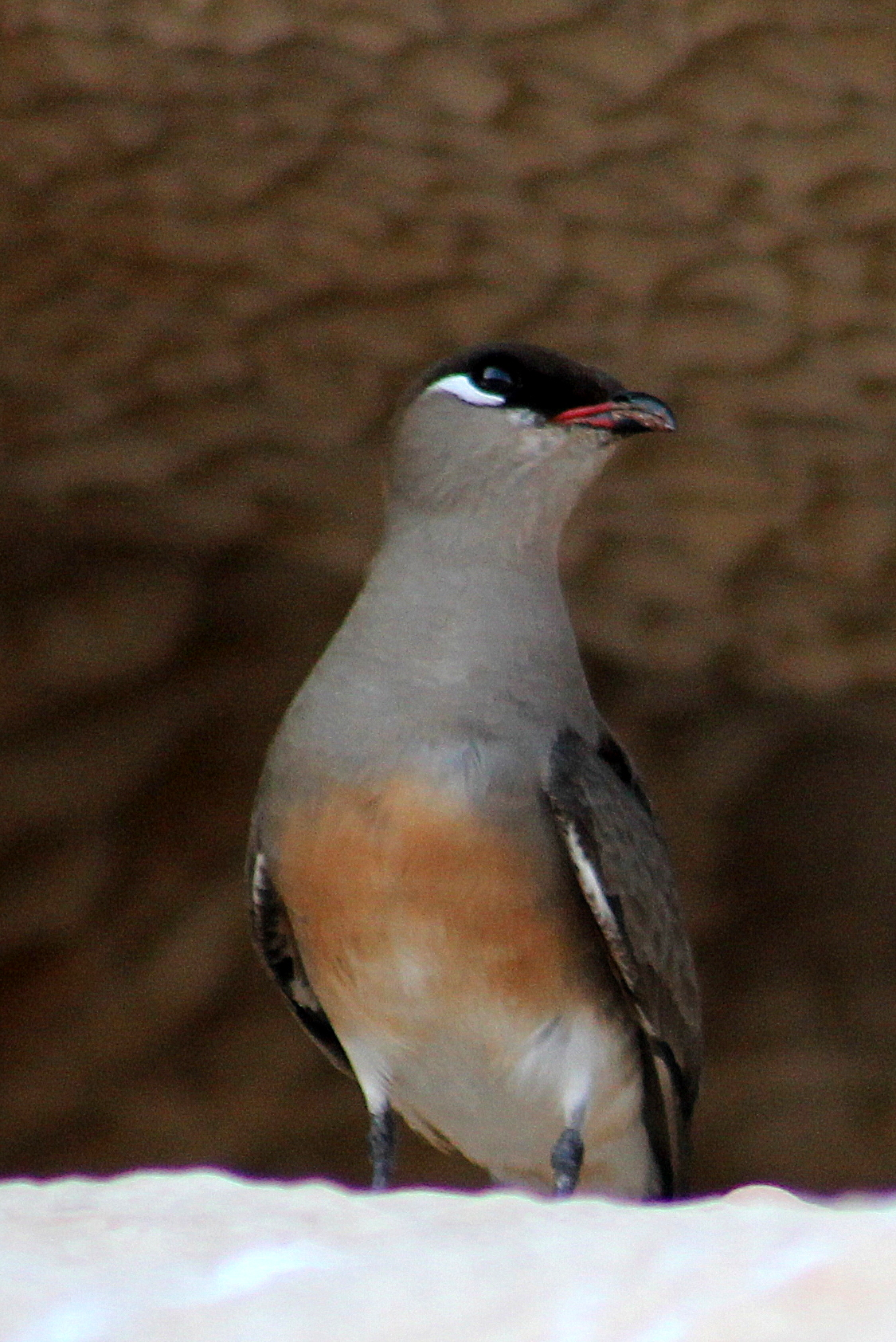 Madagaskarvorkstaartplevier langs de Manambolo